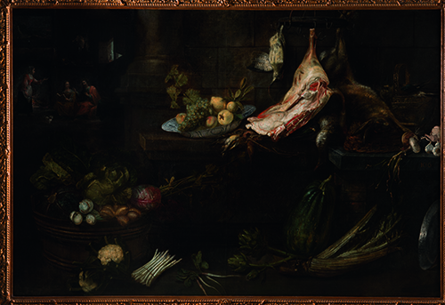 Frans Ykens, Keukenstuk met Christus in het huis van Marta en Maria, ?, olieverf op doek, 162 x 242,5 x 4 cm.